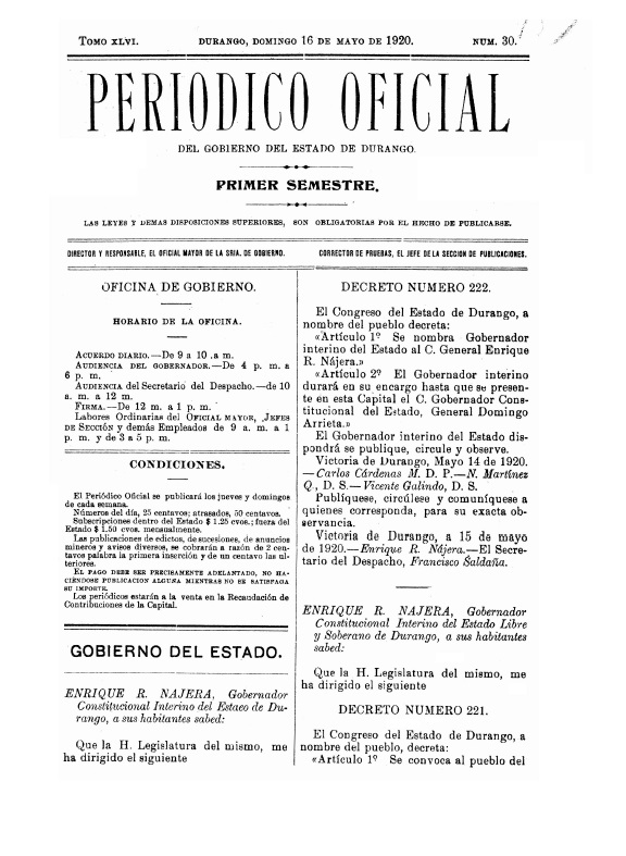 Biblioteca Nacional Digital de México, UNAM